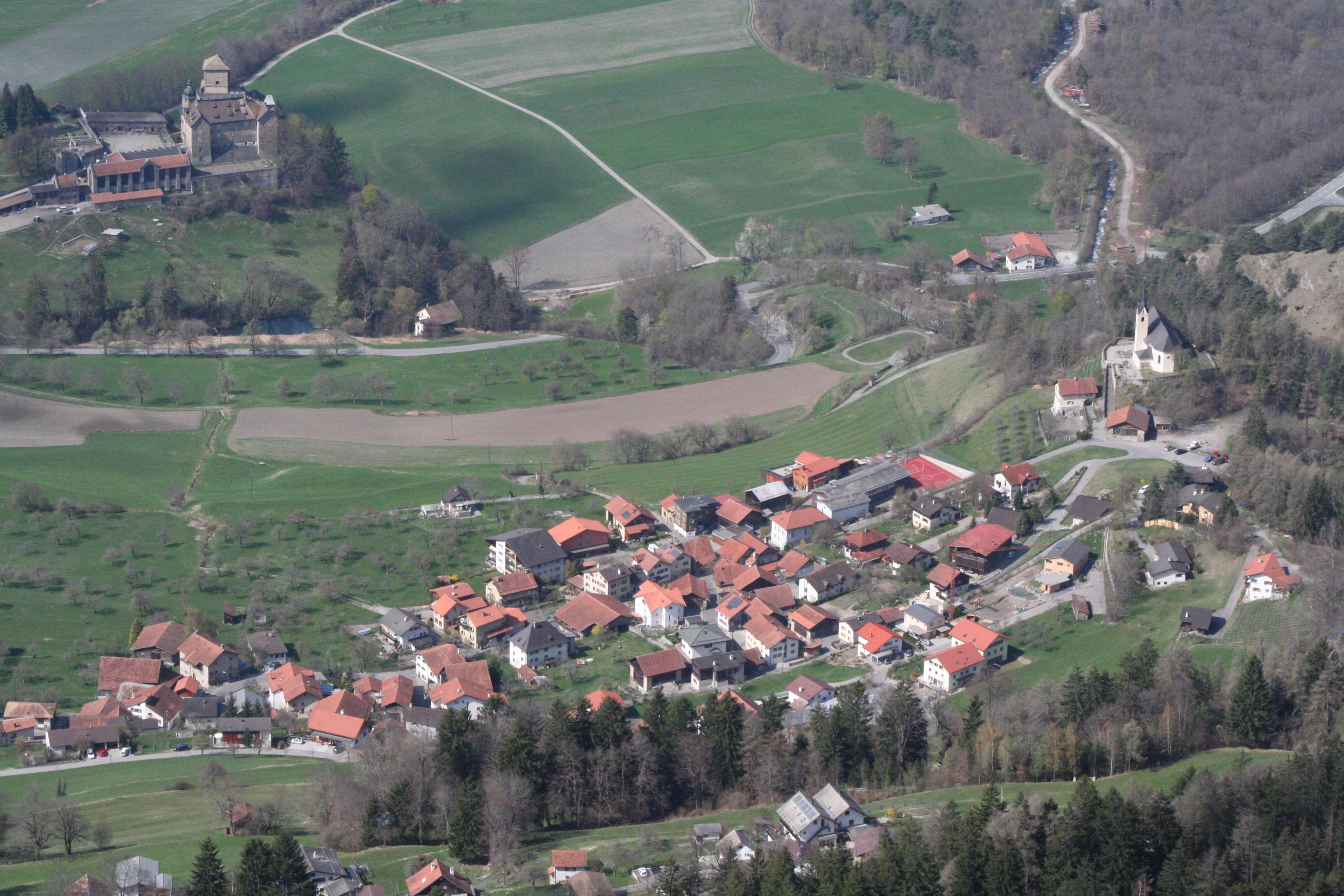 Blick auf Tumegl/Tomils